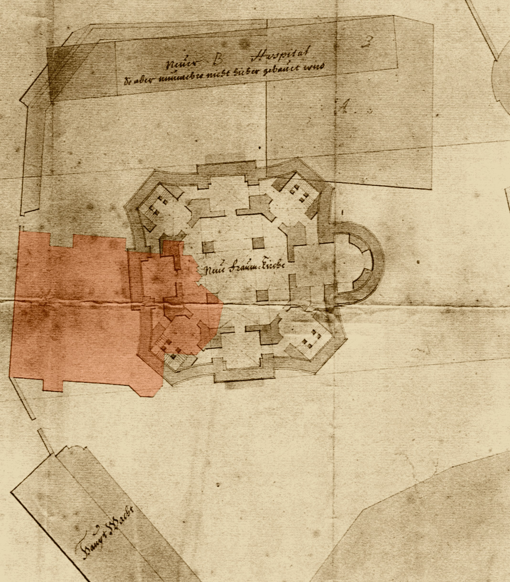 Lageplanentwurf für die neue Frauenkirche; Projektzeichung über dem Grundriss des Vorgängerbaus (dieser durch Benutzer:Paulae rot hervorgehoben); Zeichnung vermutlich von George Bähr, um 1725